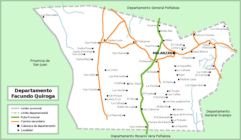 Esquema de localidades, caseríos y parajes del Departamento General Juan Facundo Quiroga, provincia de La Rioja, Argentina